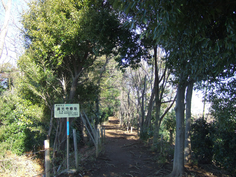 栗木２丁目・真光寺緑地